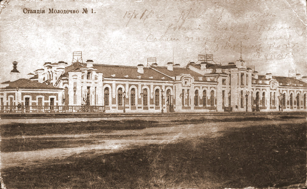 Чыгуначная станцыя ў Маладзечна